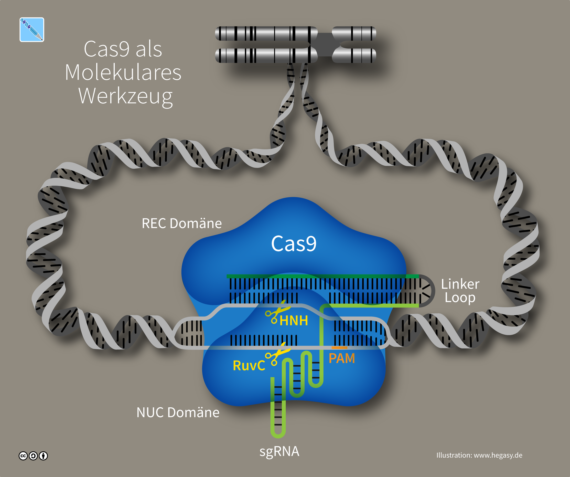 CRISPR-Cas9 kann als molekulares Werkzeug gezielte DNA-Doppelstrang Brüche einführen. Wenn die Sequenzen von tracrRNA und crRNA mit einem Tetraloop verbunden werden, entsteht eine single-guidance RNA (sgRNA), welche sich chemisch einfach synthetisieren lässt. So wird CRISPR/Cas9 zum einfach programmierebaren Werkzeug. Der Komplex aus sgRNA und Cas9 scannt intrazelluläre DNA nach einem Protospacer Adjacent Motif (PAM). Wird ein solches Motiv gefunden, wird die komplementäre DNA mit der crRNA-Region verglichen. Stimmen diese überein, so wird der DNA-Doppelstrang geschnitten. Die HNH Domäne schneidet den Ziel-Strang, während die RuvC-Domäne den gegenüberliegenden Strang schneidet.